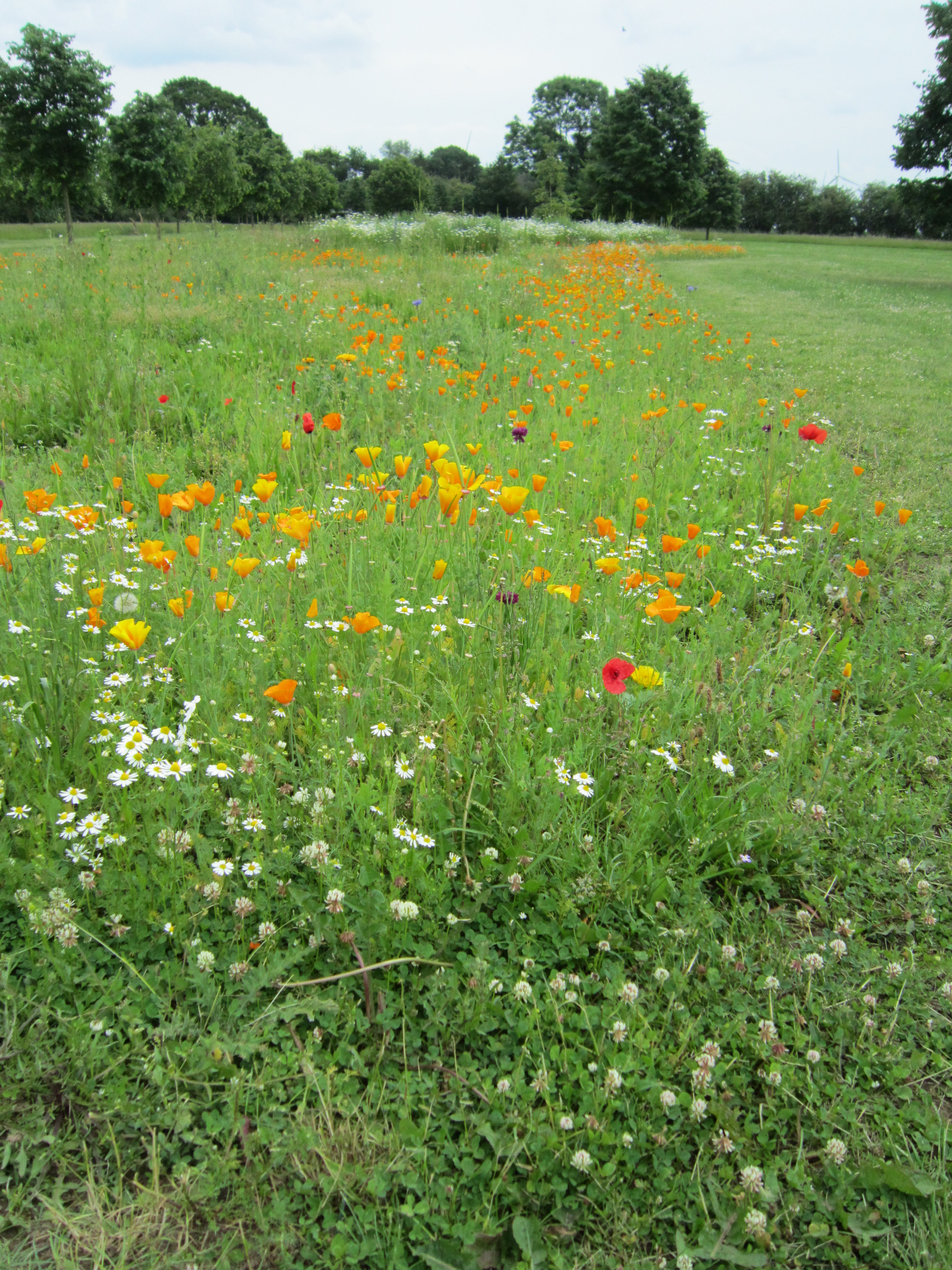 Wiese im Baumpark bei Erbhof Thedinghausen (Landkreis Verden, Niedersachsen)